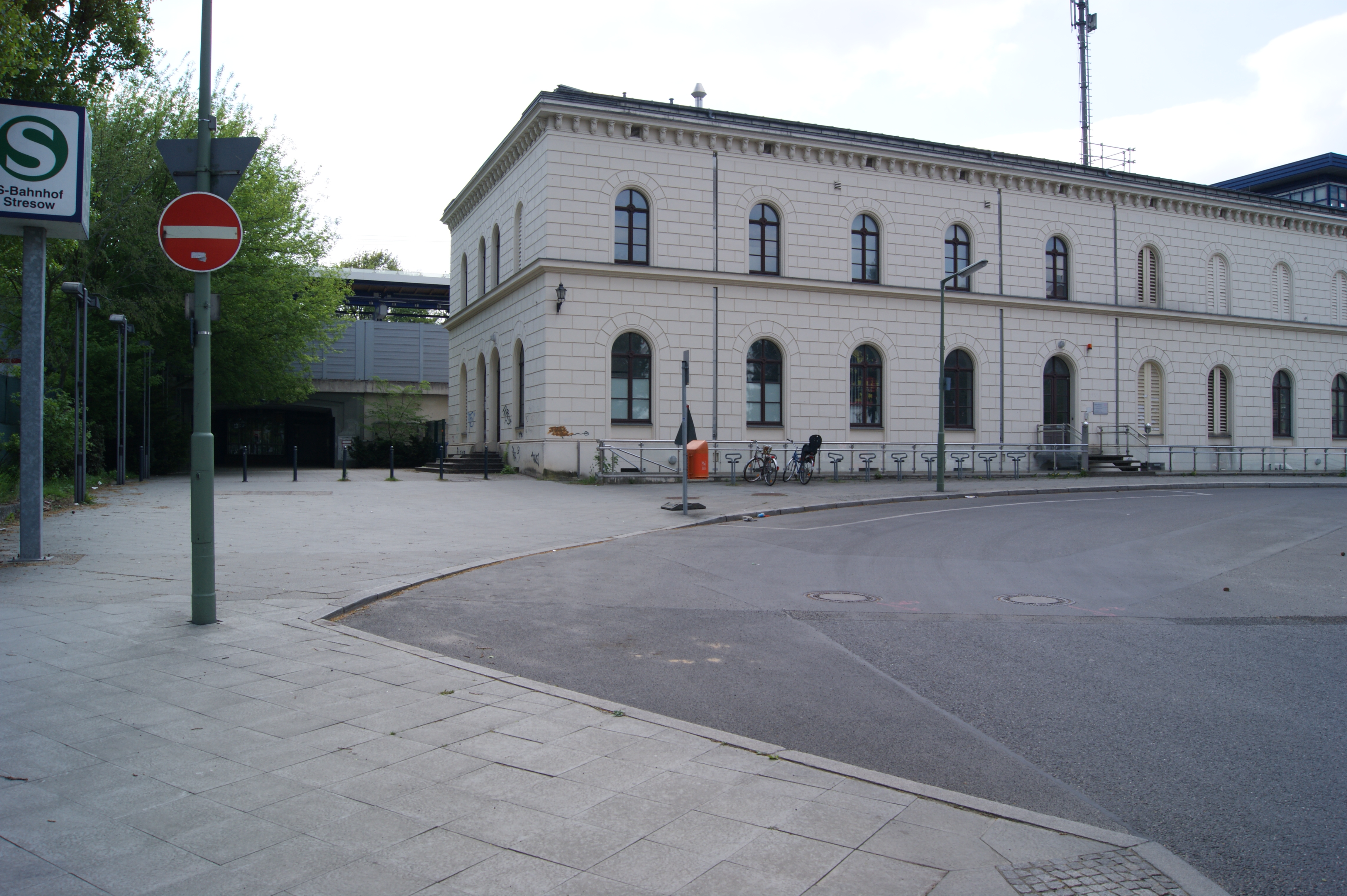 Empfangsgebaeude Bahnhof Berlin-Stresow.